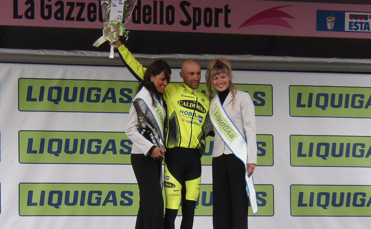 Stefano Garzelli, alla premiazione della 19a tappa del Giro d'Italia 2004, Bormio 2000 - Presolana.